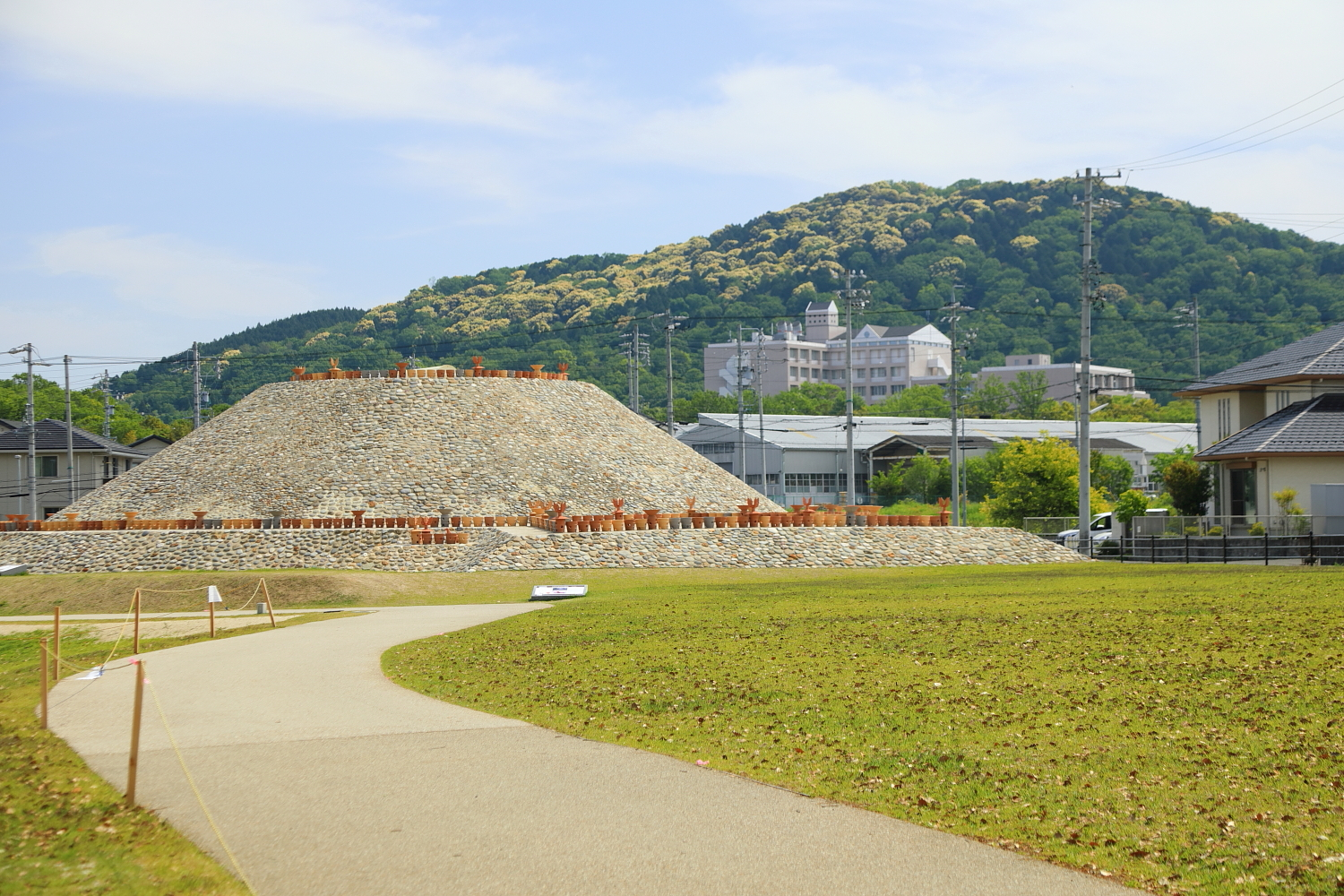 東谷山と志段味大塚古墳（名古屋市守山区上志段味、2019年（令和元年）5月）